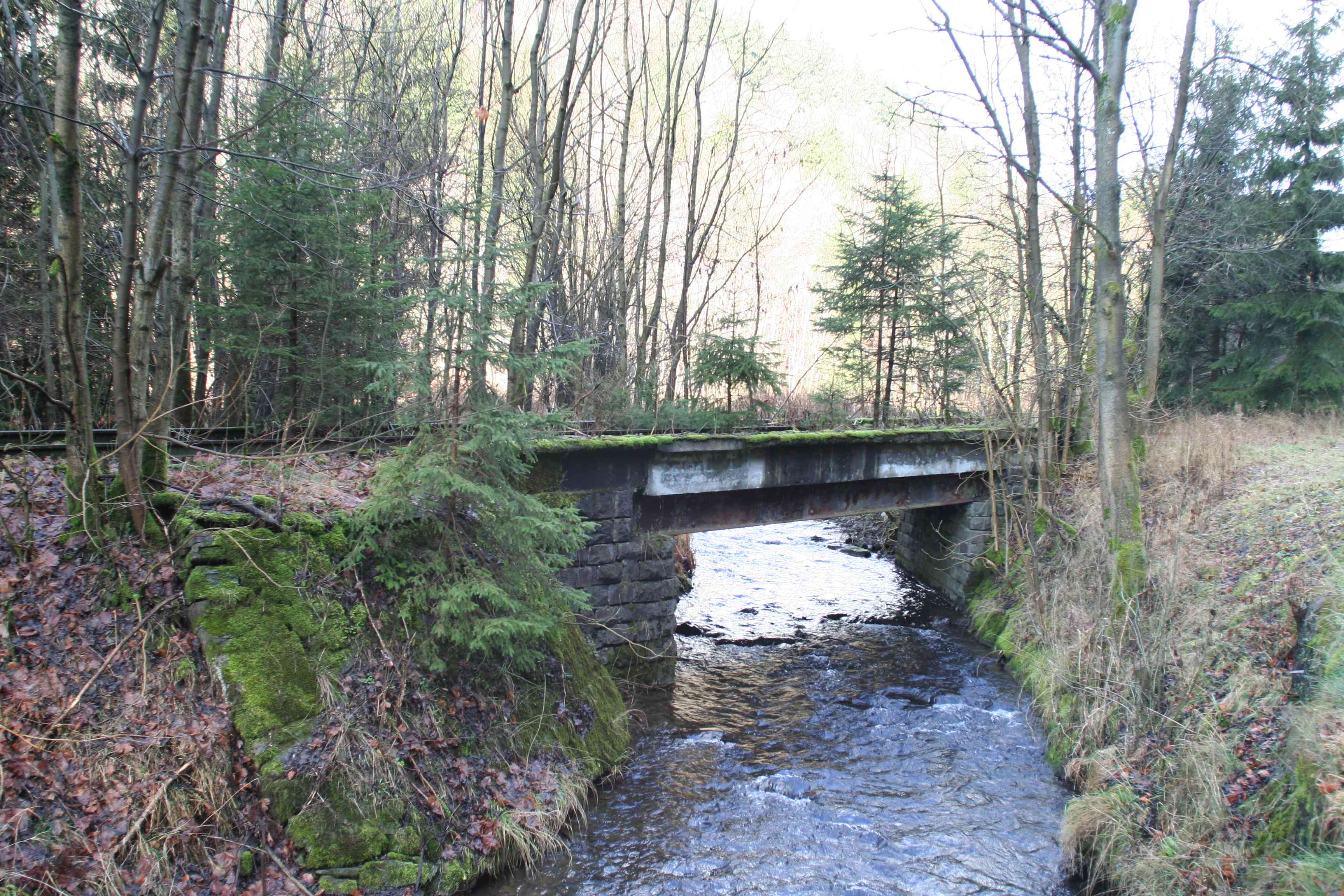 Brücke über die Tettauehemalige Eisenbahnbrücke über die Tettau bei Schauberg (Landkreis Kronach), Bahnstrecke Pressig-Rothenkirchen–Tettau